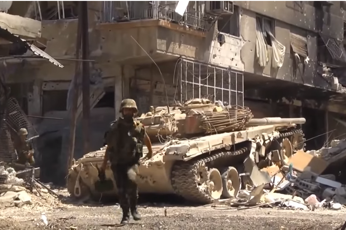 Armée syrienne lors de combats urbain appuyée par des chars.